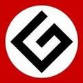 Икона граммар-нацистского сообщества, необходима мне для юзербокса.